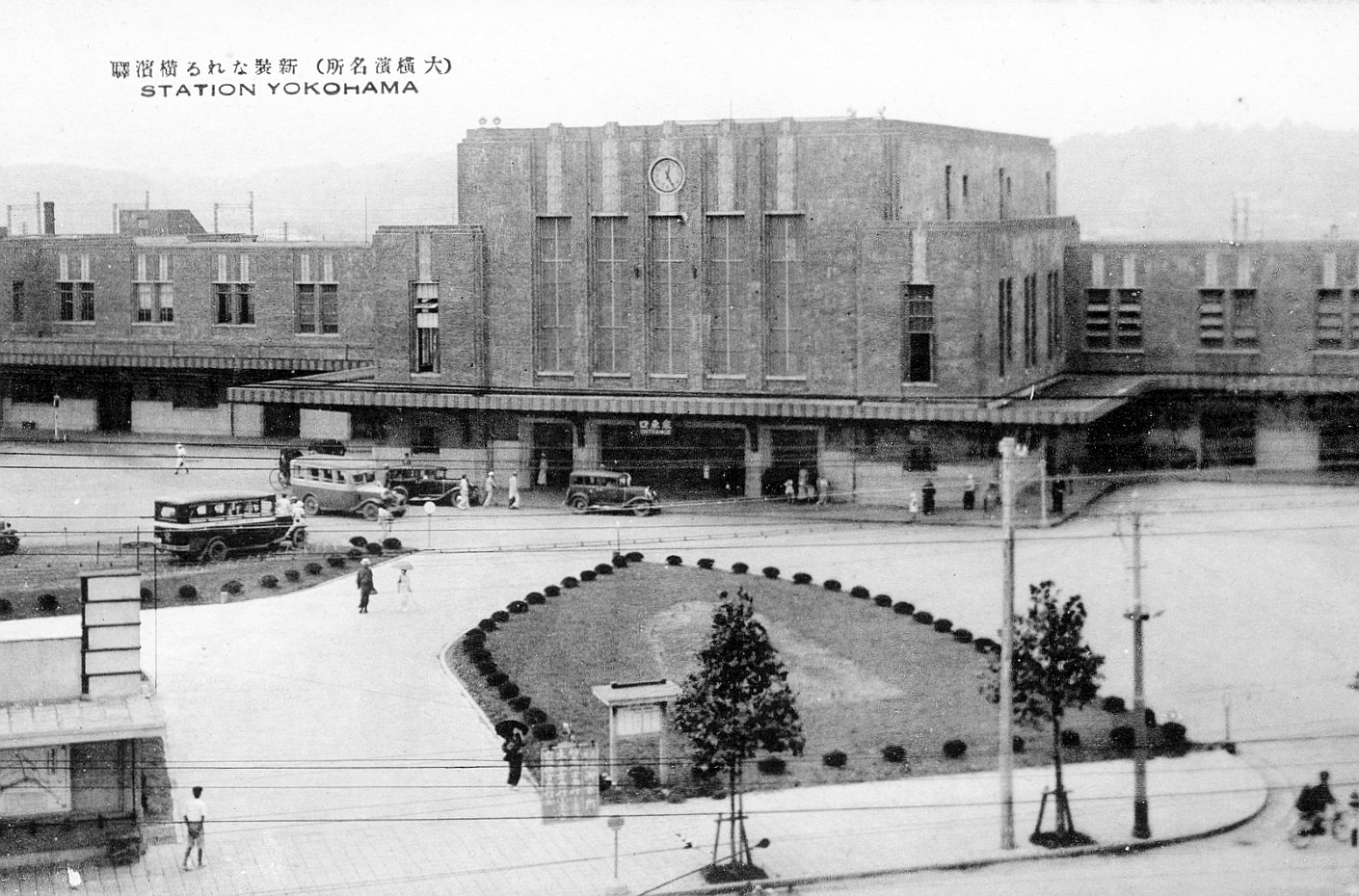 3代目横浜駅駅舎（東口）。 「復興の横浜 横浜市震災記念館 RECONSTRUCTED YOKOHAMA EARTHQUAKE MEMORIAL MUSEUM」10枚入のうちの1枚「（大横浜名所） 新装なれる横浜駅」。1930年頃の撮影。